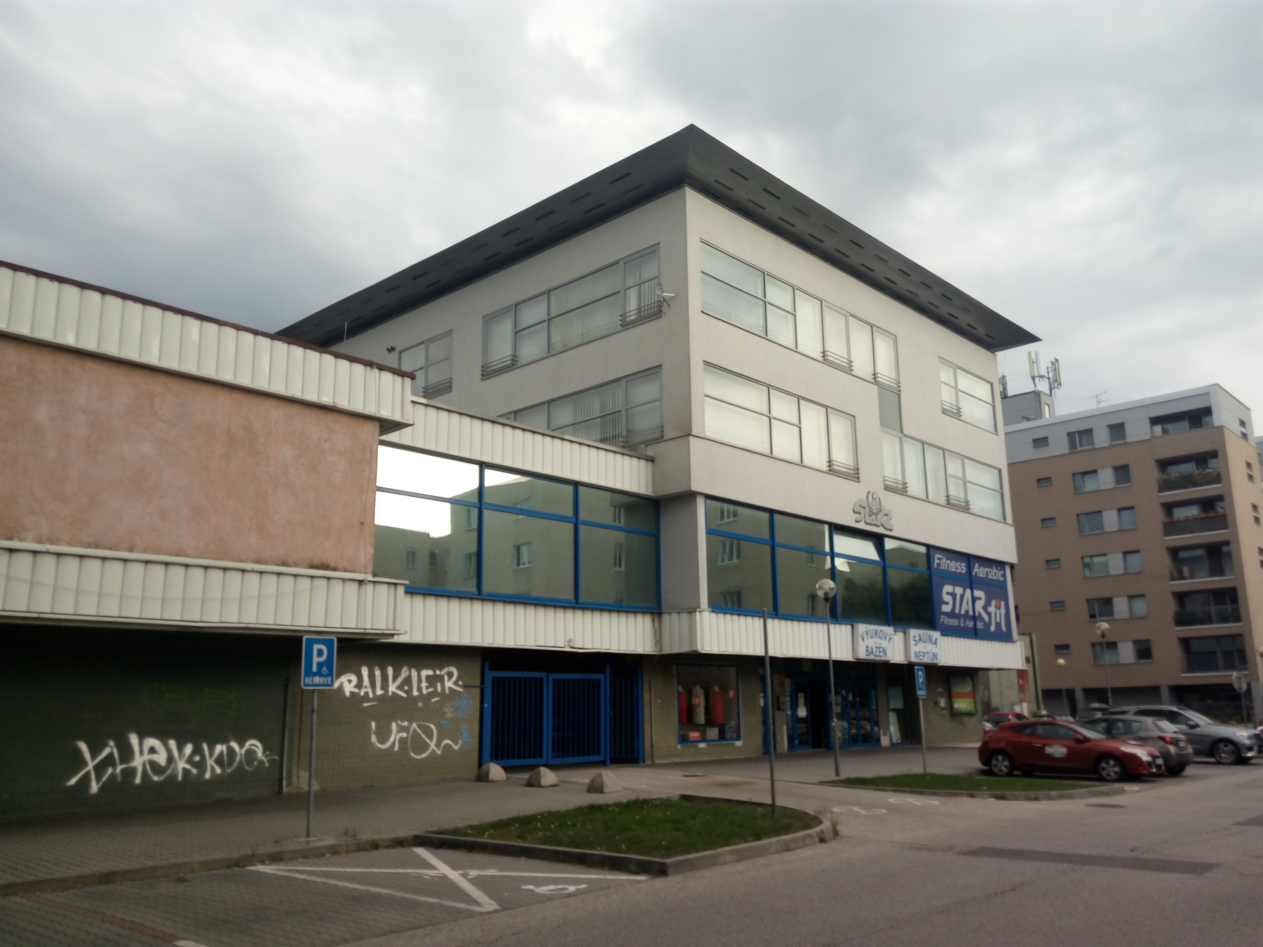 Junácka 6, Nové Mesto, Bratislava